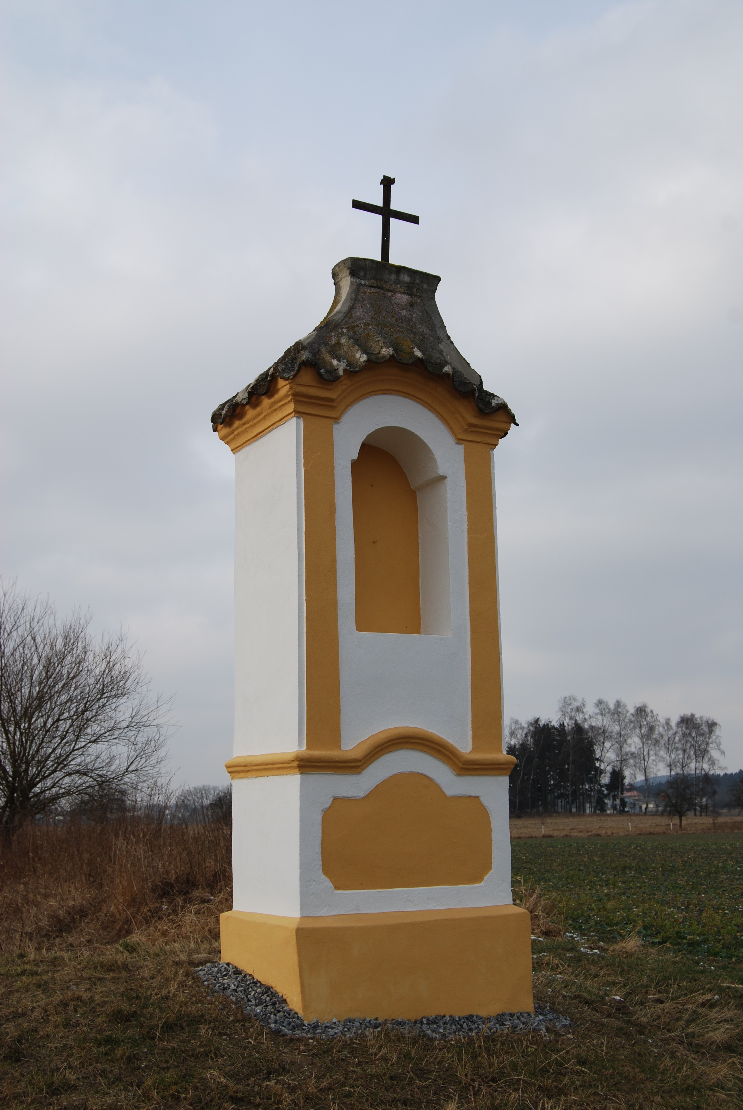 Boží muka sv. Prokopa z první poloviny 19. století u bývalé cesty do Radomyšle. Osek. Okres Strakonice. Česká republika.